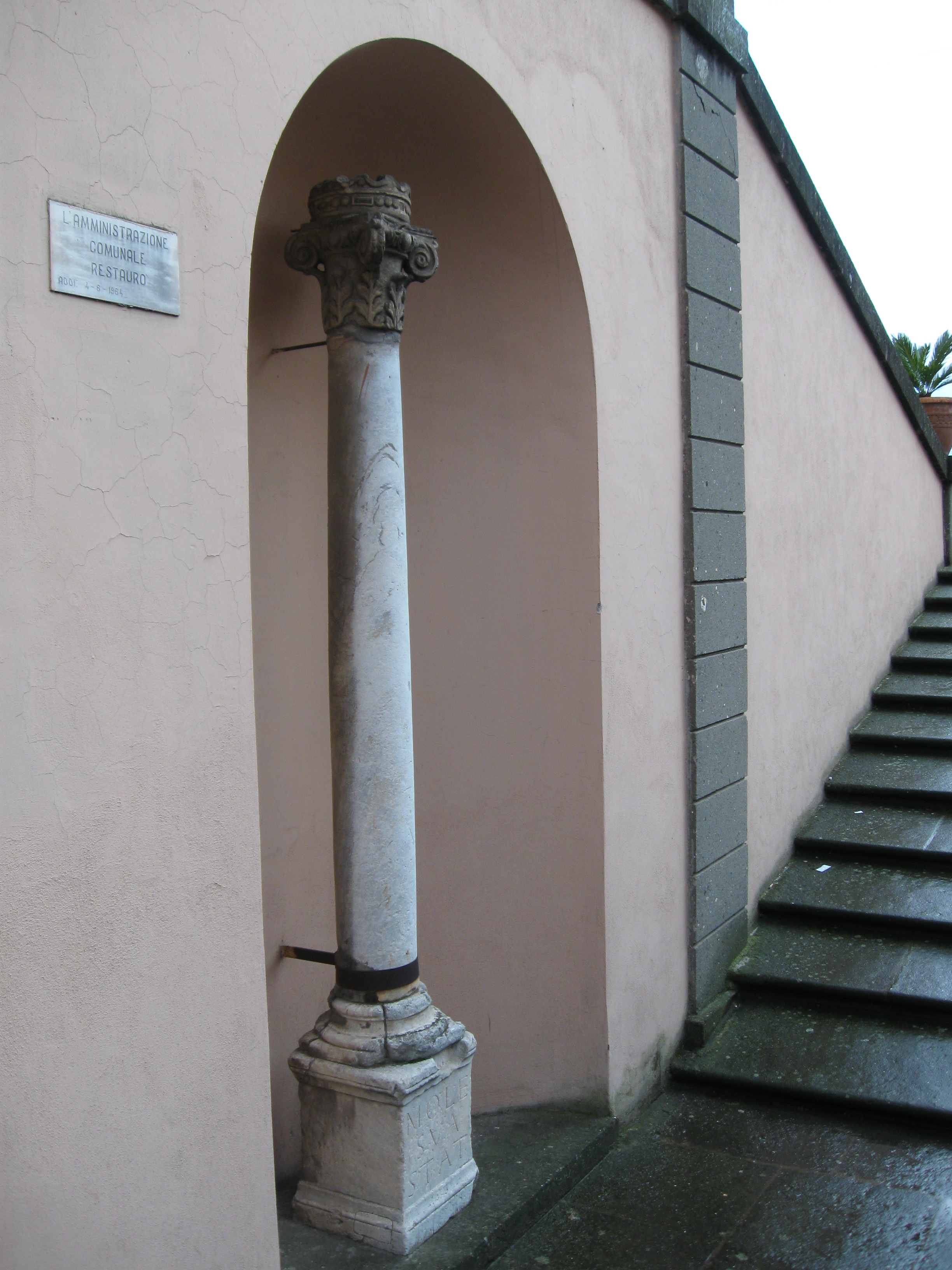 La colonna del nicchione della facciata di Palazzo Colonna a Marino (RM)